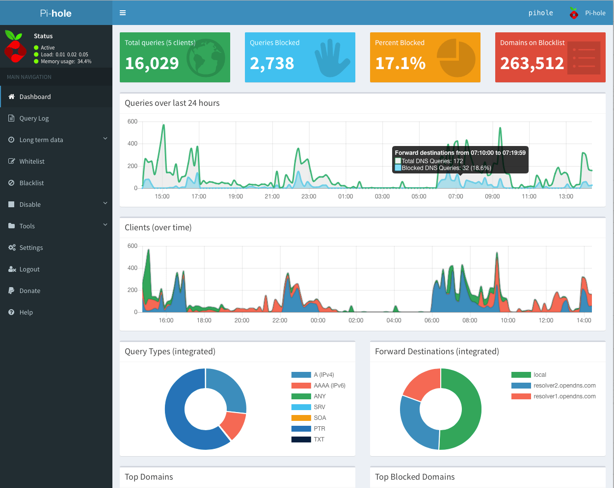 Captura de Pi-hole